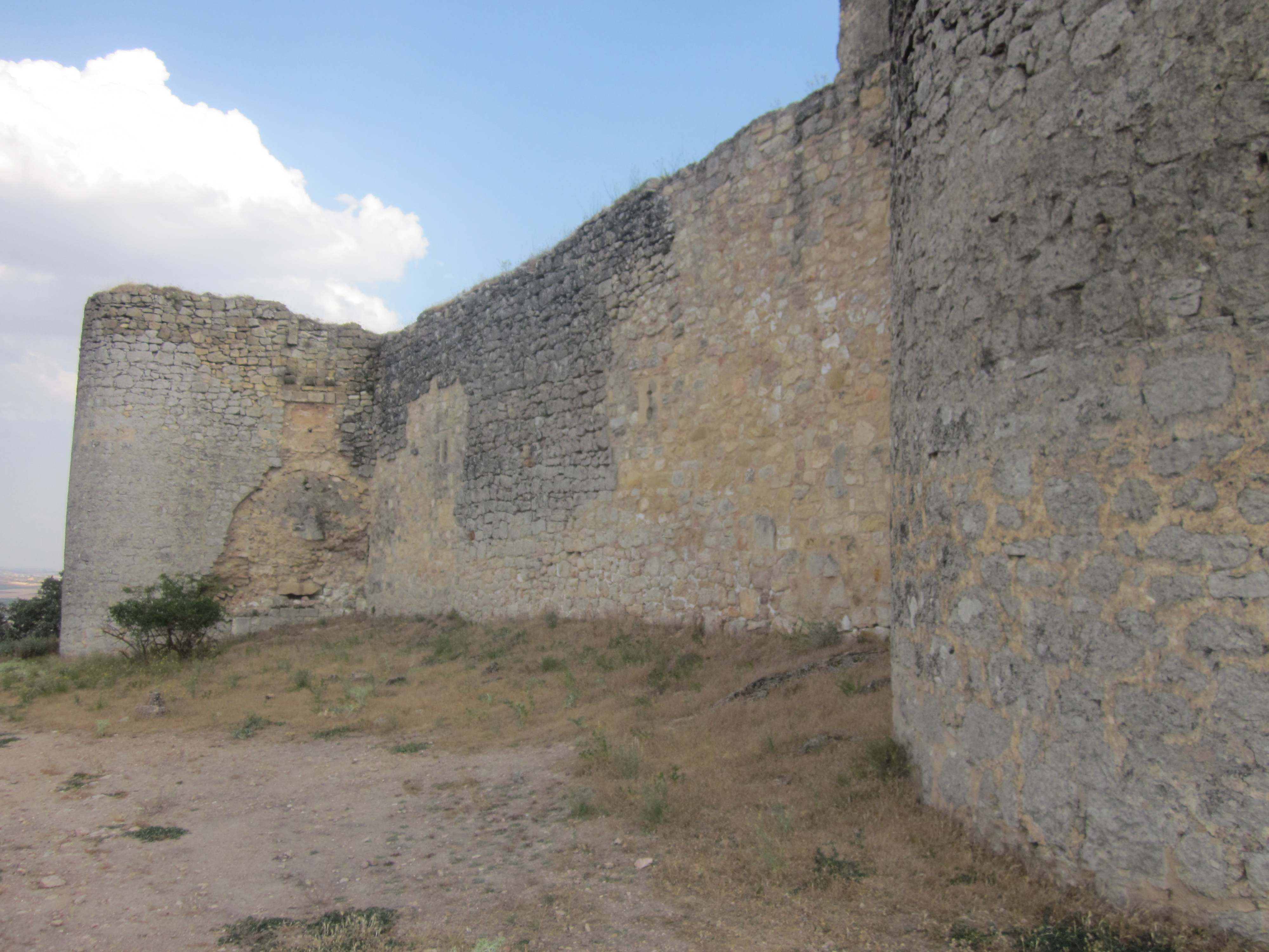 Entrada original al primer recinto del castillo de Puebla de Almenara. Cuenca